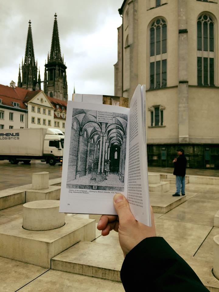 synagoga řezno